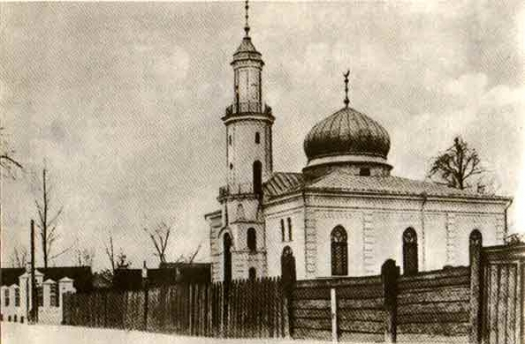 Мінская мячэць